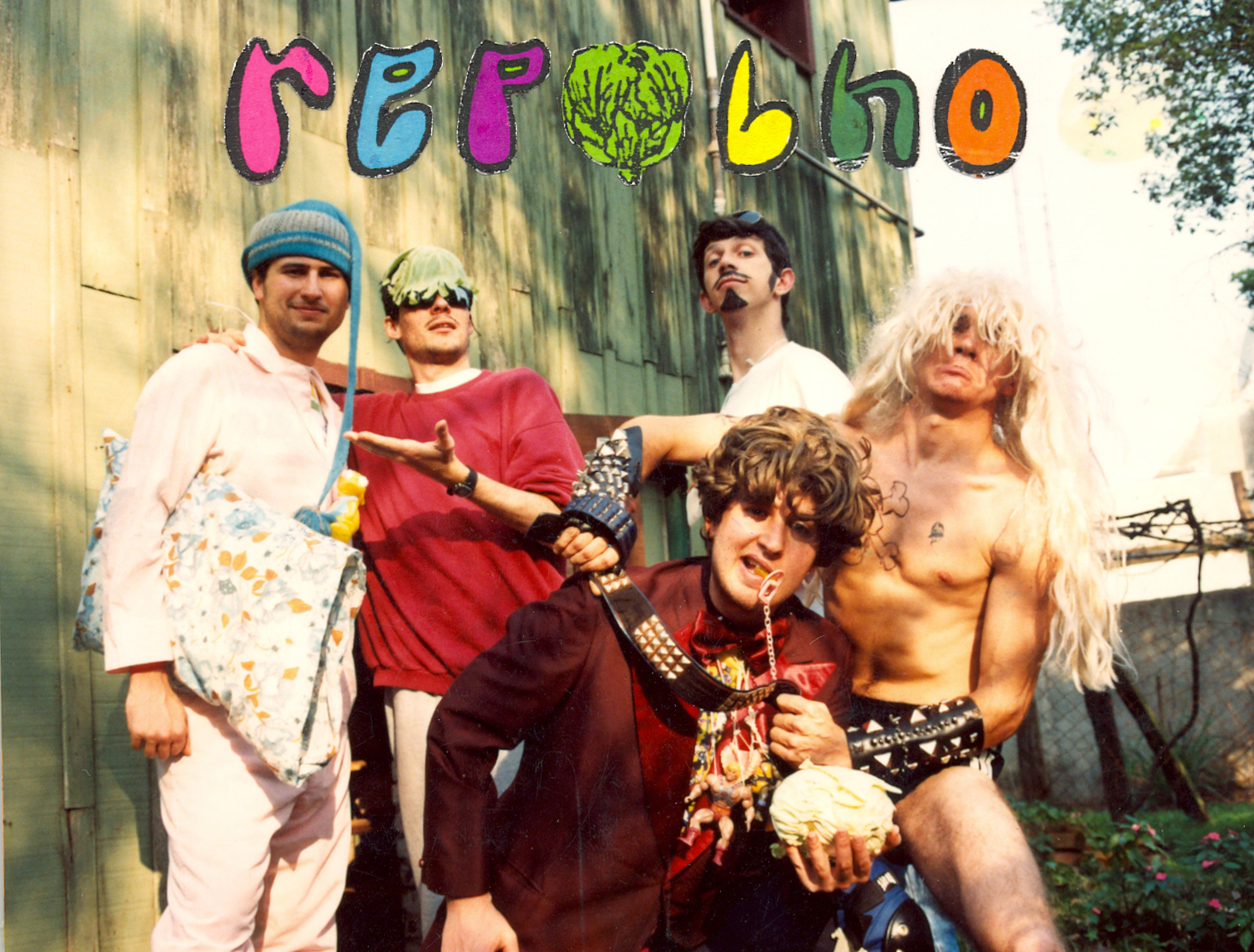 demo-tape, Repolho e a horta da alegria